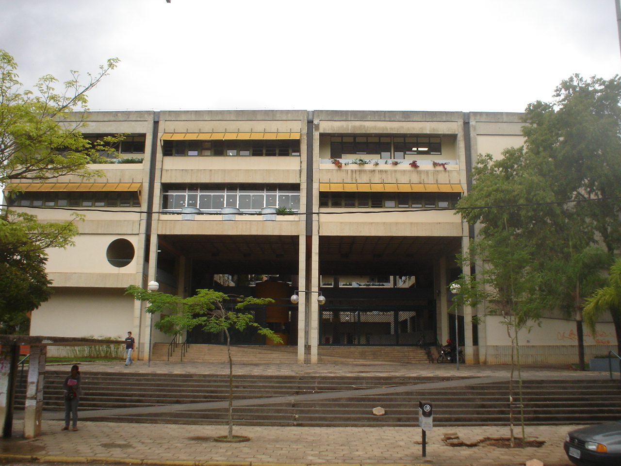 Fachada da Escola de Ciência da Informação no campus da UFMG.